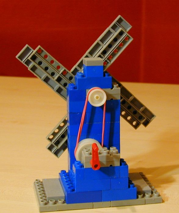 Windmühle, gebaut nach der Bauanleitung des Technik-Bausatzes von Rasti, der auch über das Versandhaus Quelle vertrieben wurde.